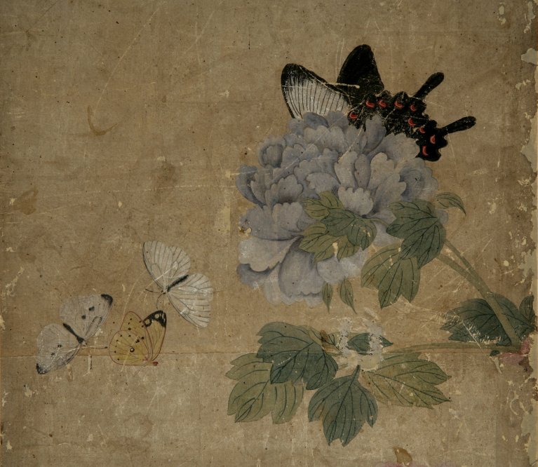 모란호접도 부분 확대, 종이에 채색, 미국 메트로폴리탄 미술관 소장